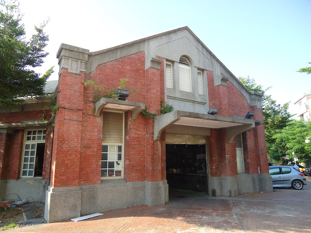 北斗紅磚市場是位於臺灣彰化縣北斗鎮的公有市場建築，於2008年4月11日公告為歷史建築。